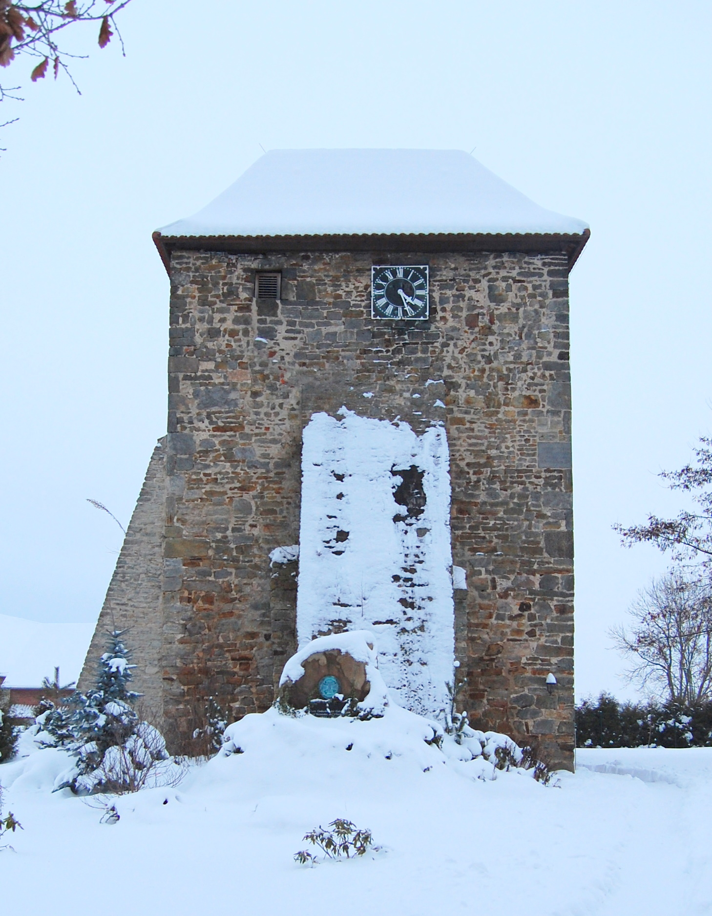 Sankt-Petrus-Kirche in Morsleben, Westseite